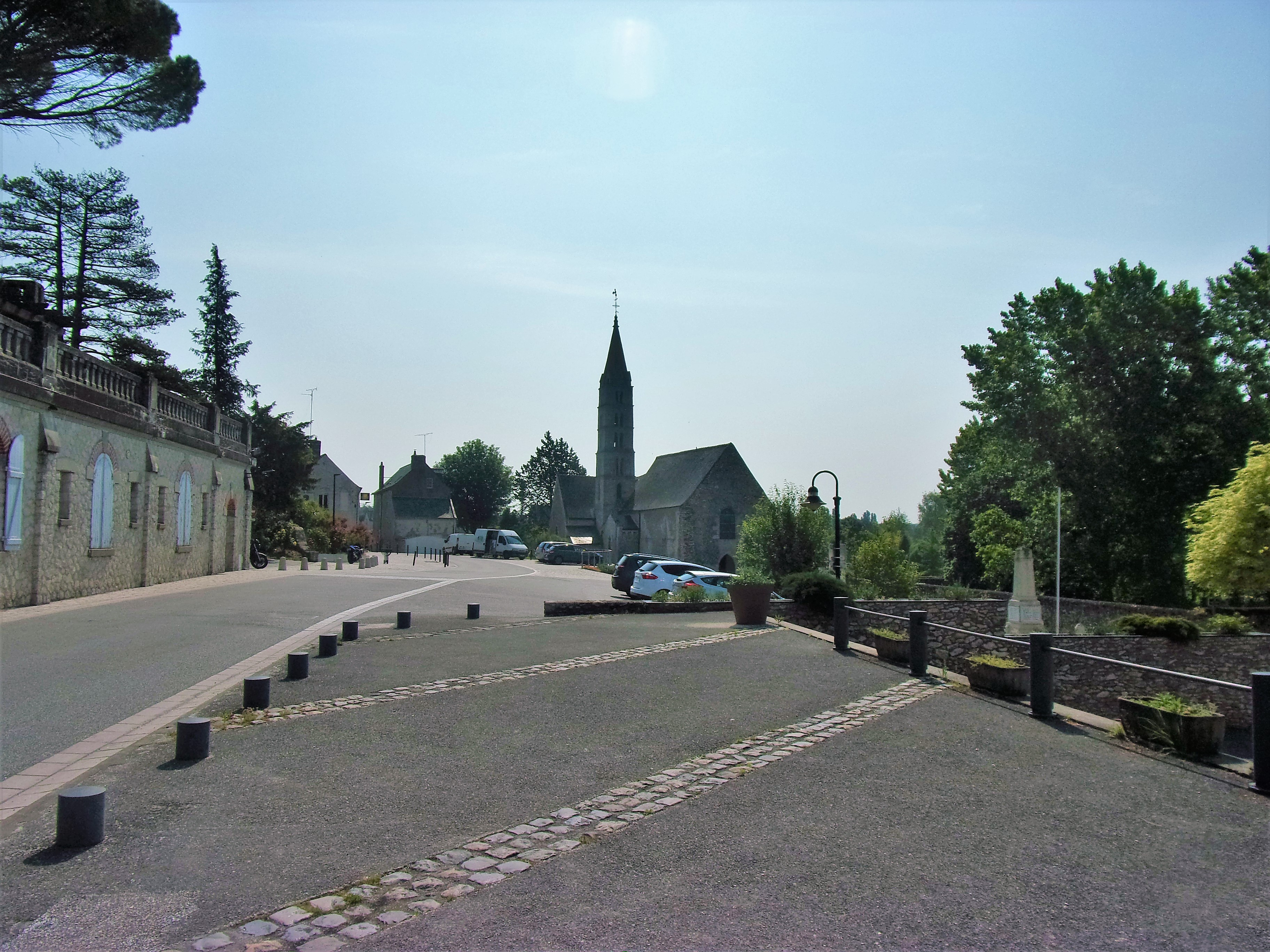 Vue générale du centre-ville de Truyes